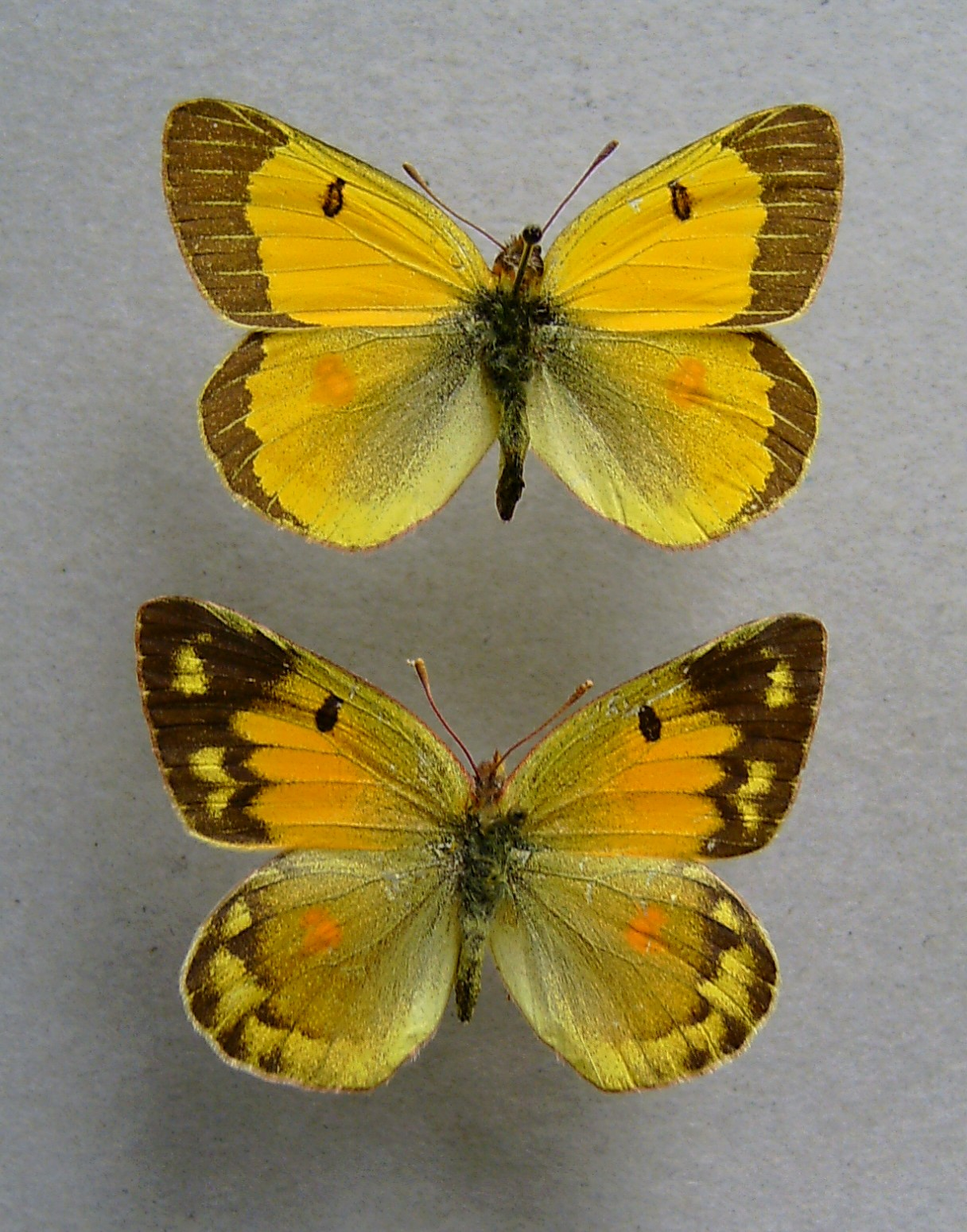 Colias chrysotheme, oben Männchen, unten Weibchen, Seewinkel, Burgenland